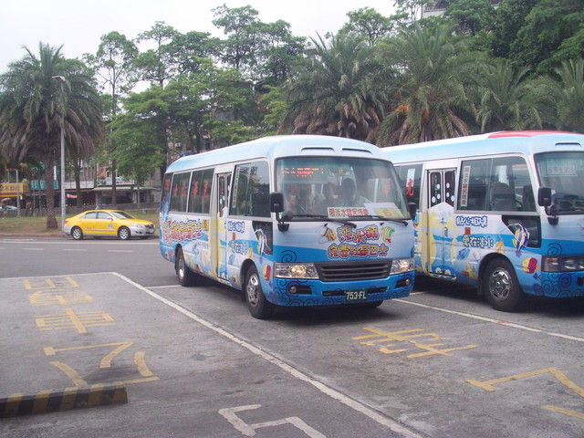 光華巴士753-FL行駛臺北縣淡水鎮免費社區巴士